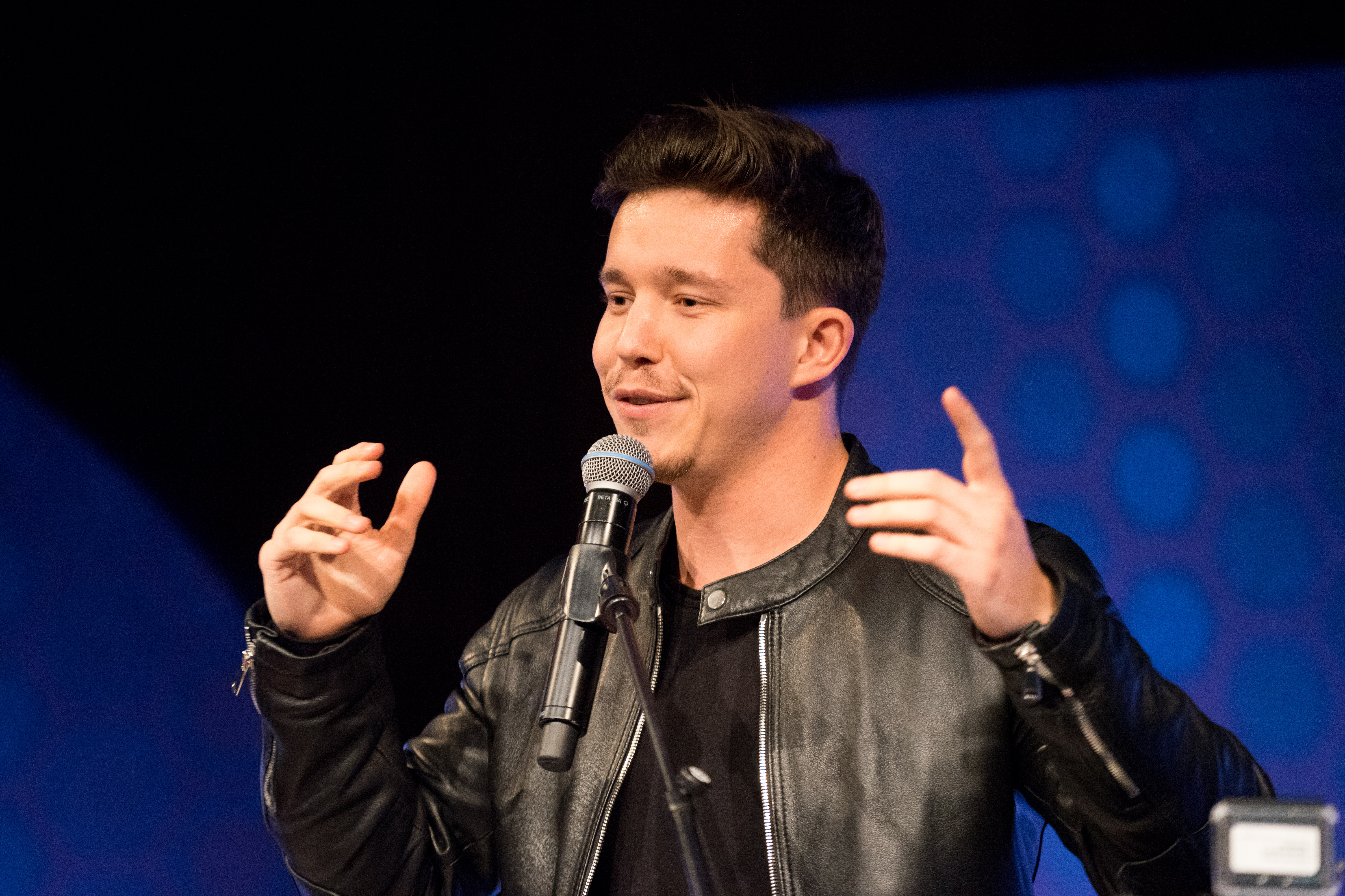 Nico Santos bei Radio Pilatus